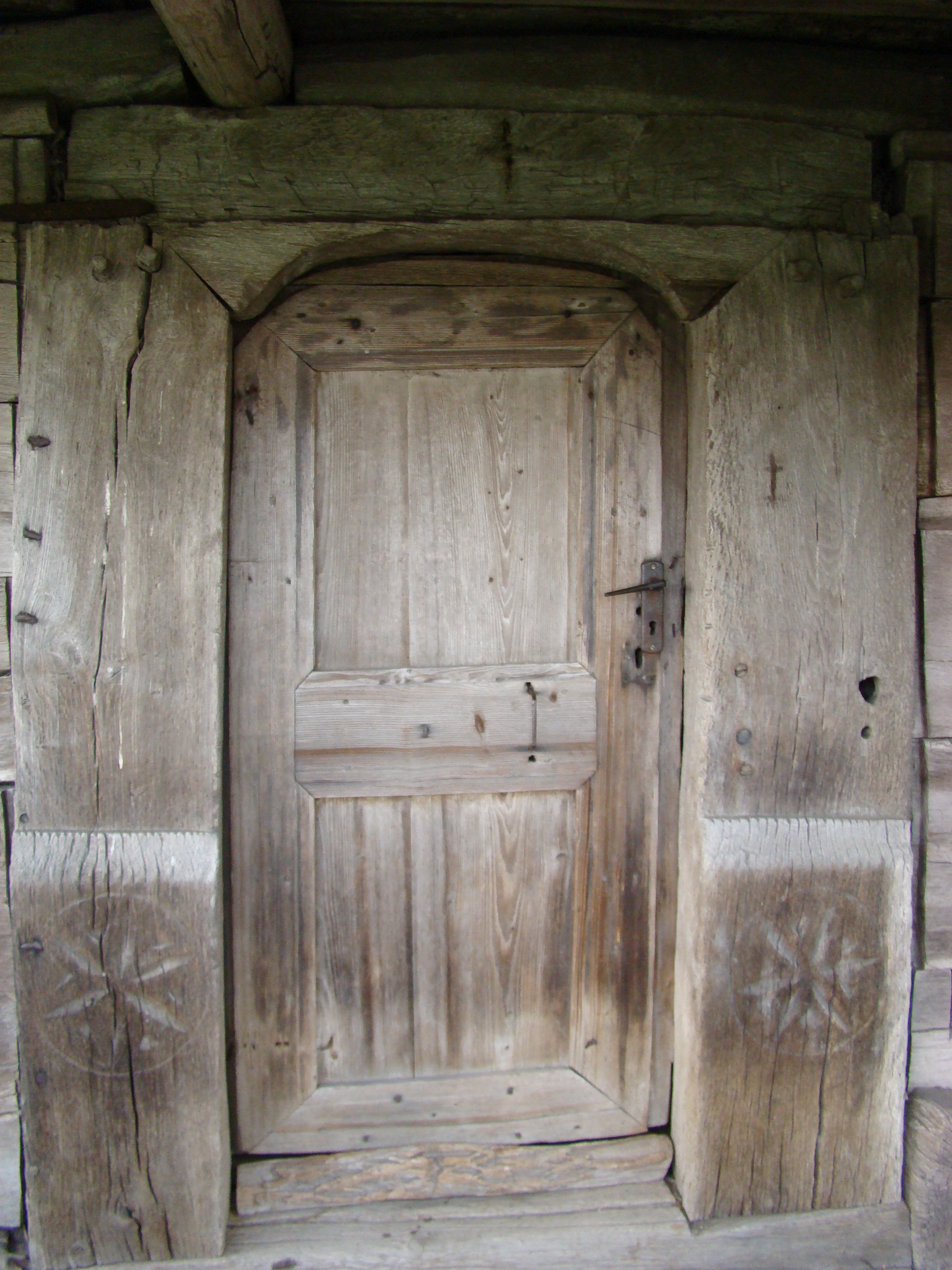 Biserica de lemn din Pruneni-portalul uşii de intrare